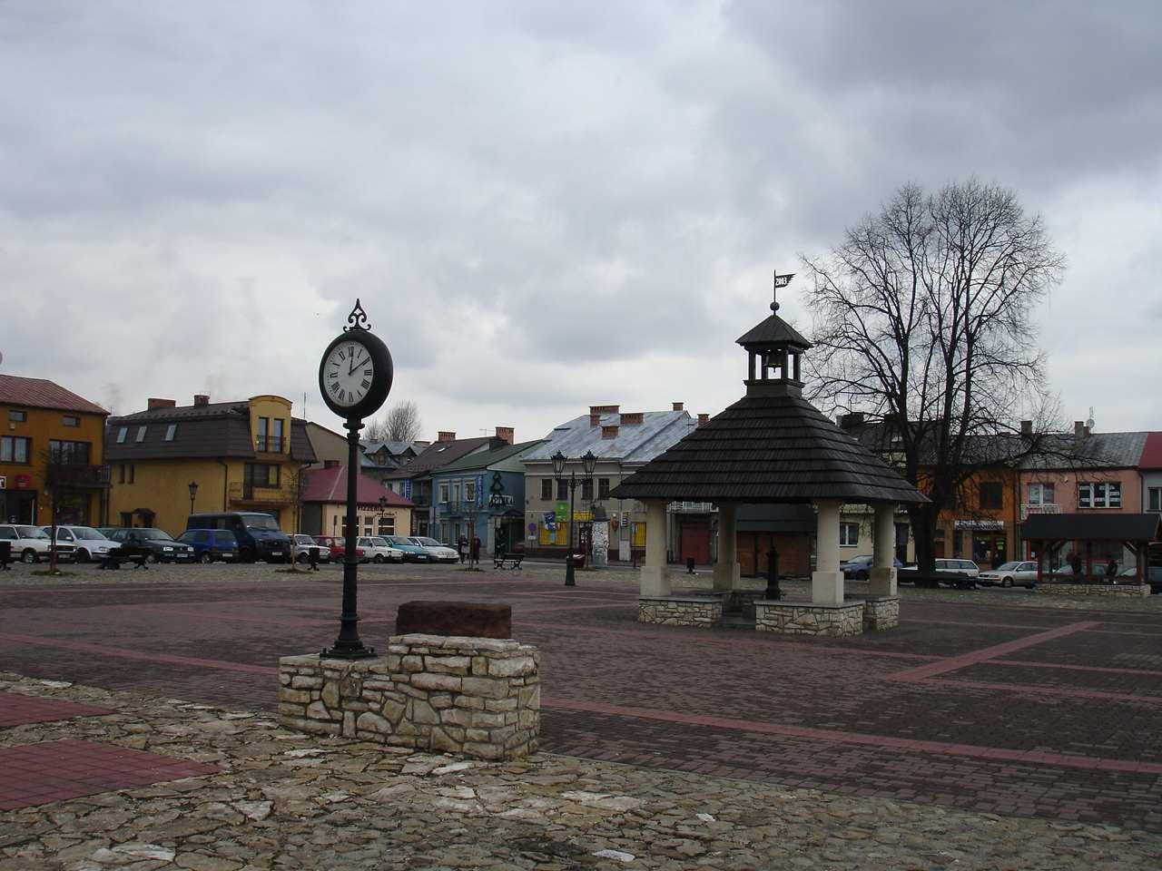 Pilica main square